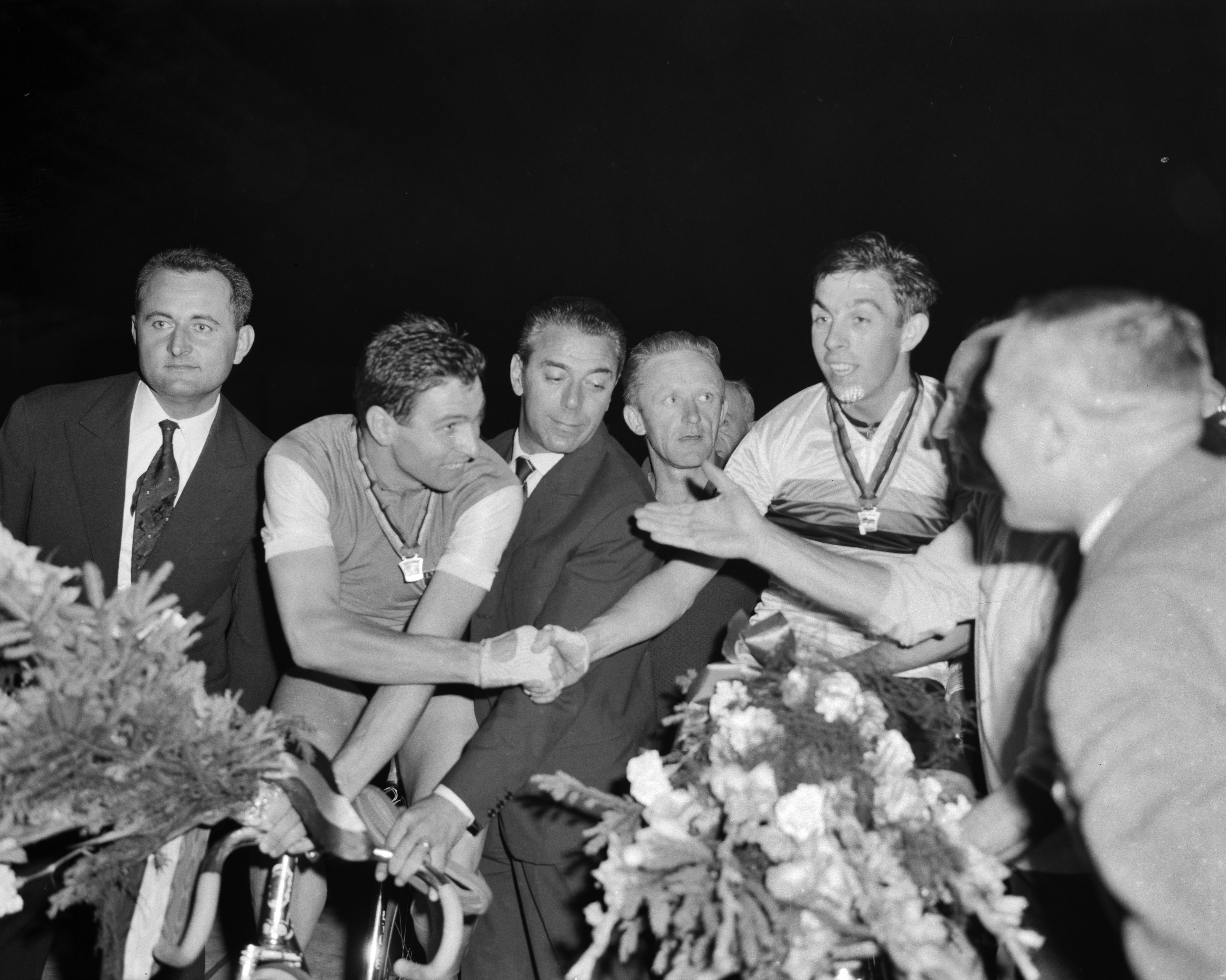 Collectie / Archief : Fotocollectie Anefo Reportage / Serie : [ onbekend ] Beschrijving : Wereldkampioenschappen te Recourt. Sprint amateurs. Links Bianchetto rechts Sercu Datum : 5 augustus 1963 Trefwoorden : AMATEURS, sprinters, wereldkampioenschappen Fotograaf : Pot, Harry / Anefo Auteursrechthebbende : Nationaal Archief Materiaalsoort : Negatief (zwart/wit) Nummer archiefinventaris : bekijk toegang 2.24.01.04 Bestanddeelnummer : 915-4022